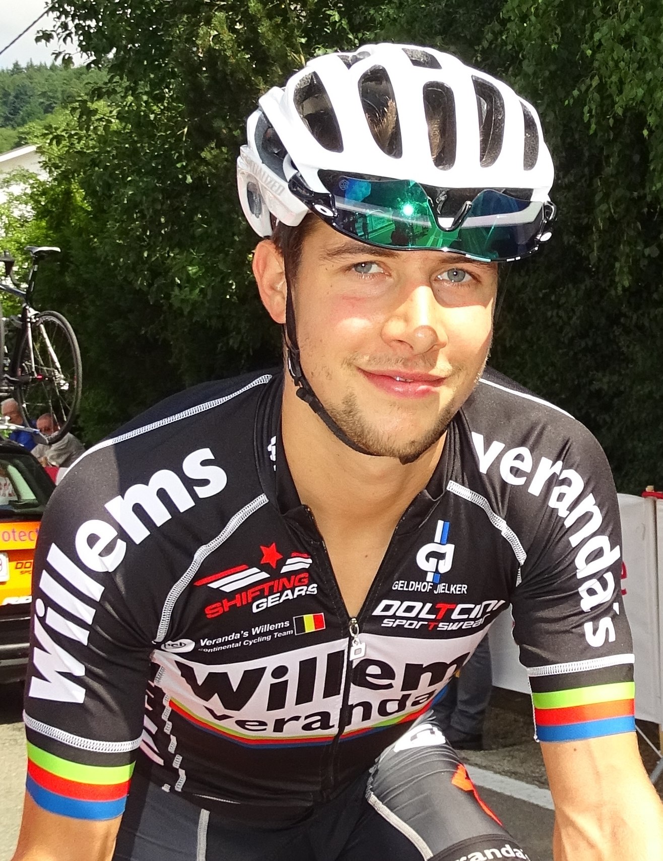 Tour de la province de Liège 2015. Depicted person: Christophe Prémont Depicted team: Veranclassic-Ekoï